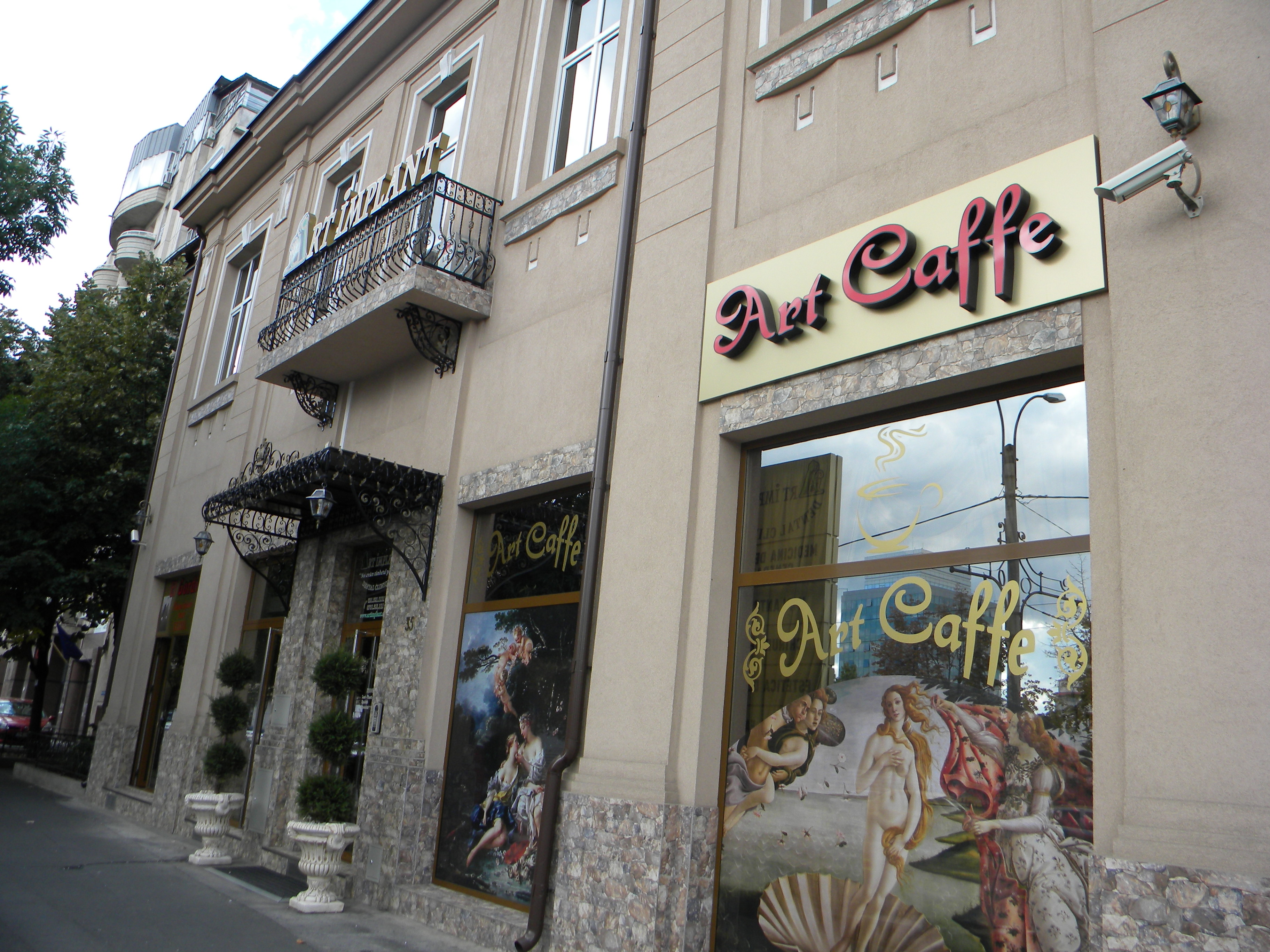 Bucuresti, Romania, Bd. Corneliu Coposu nr. 35, sect. 3